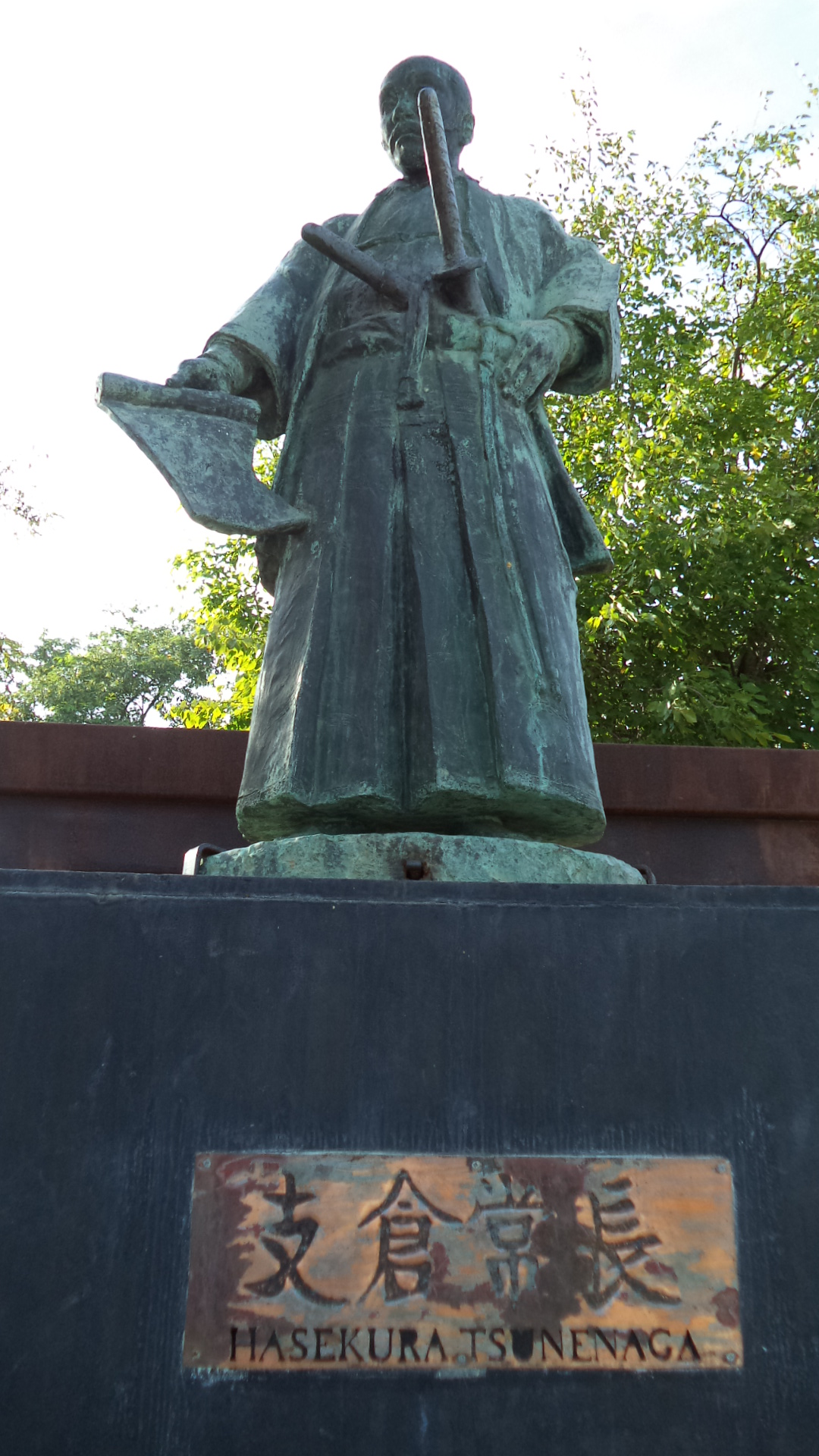 Monumento al samurai Hasekura Tsunenaga en la localidad de Coria del Río, provincia de Sevilla, España. La estatua fue regalada por el gobierno de Sendai a Coria en 1992